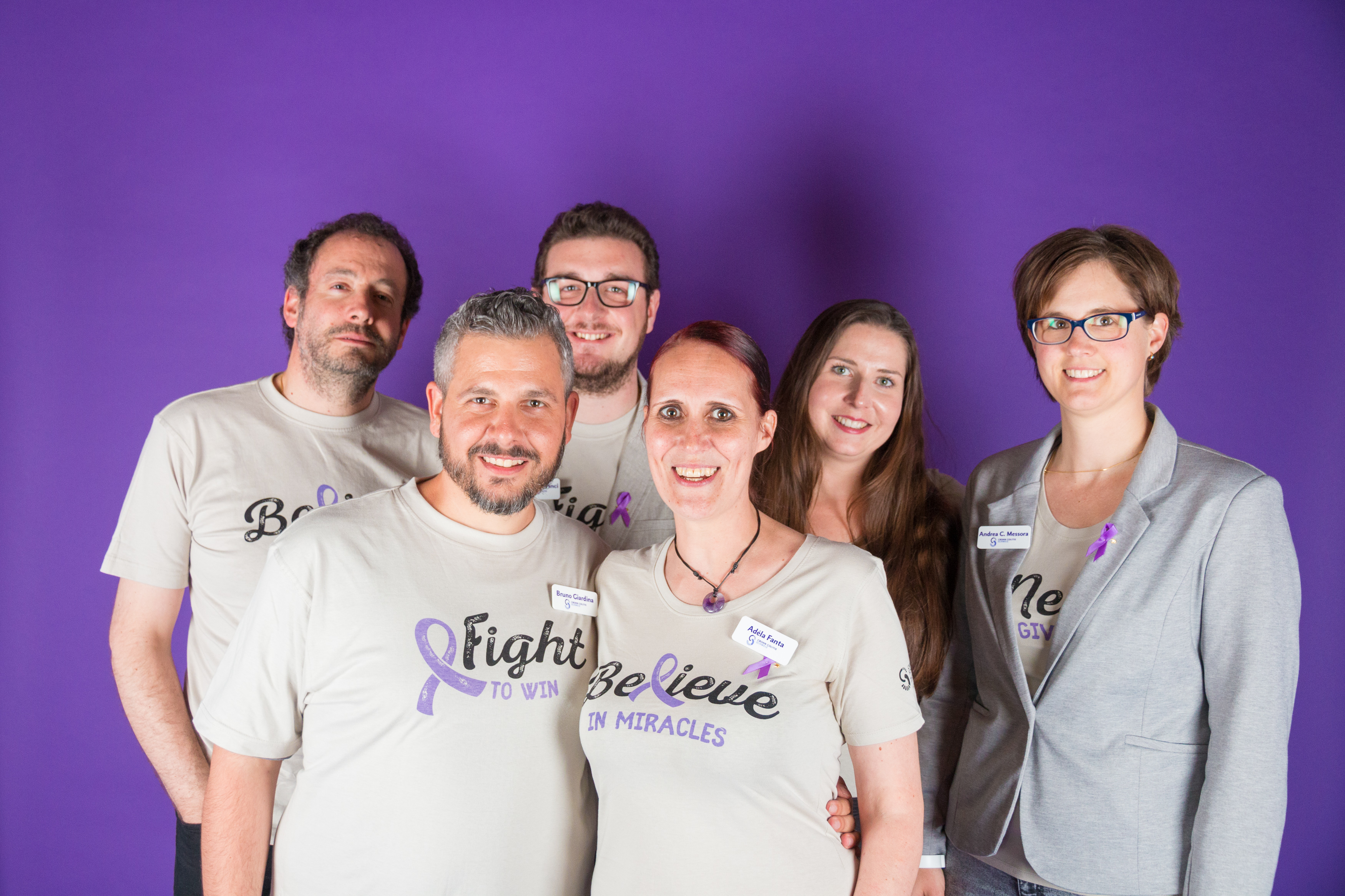 Ehrenamtliche Vorstandsmitglieder